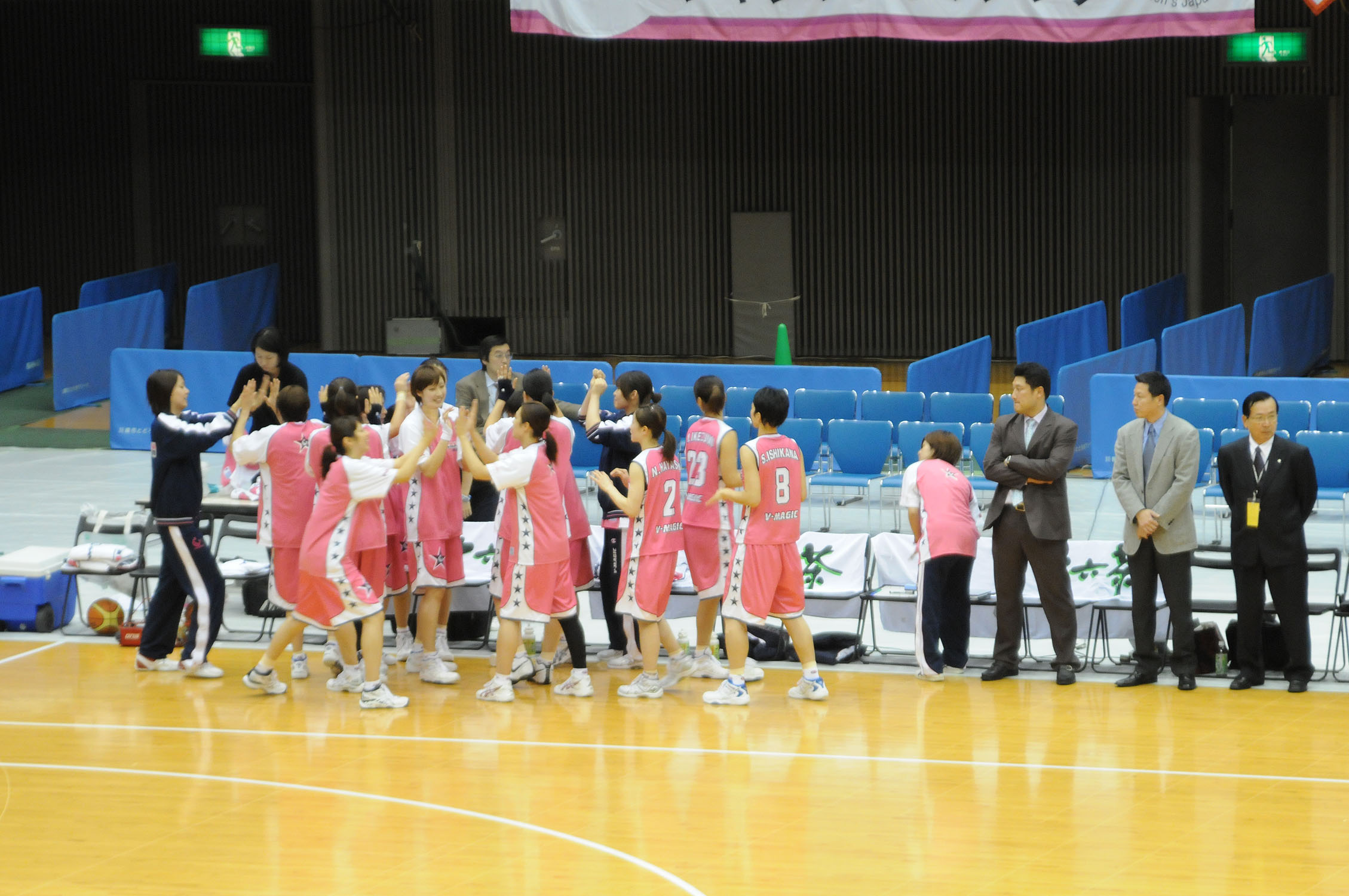 シャンソンVマジック、とどろきアリーナで。